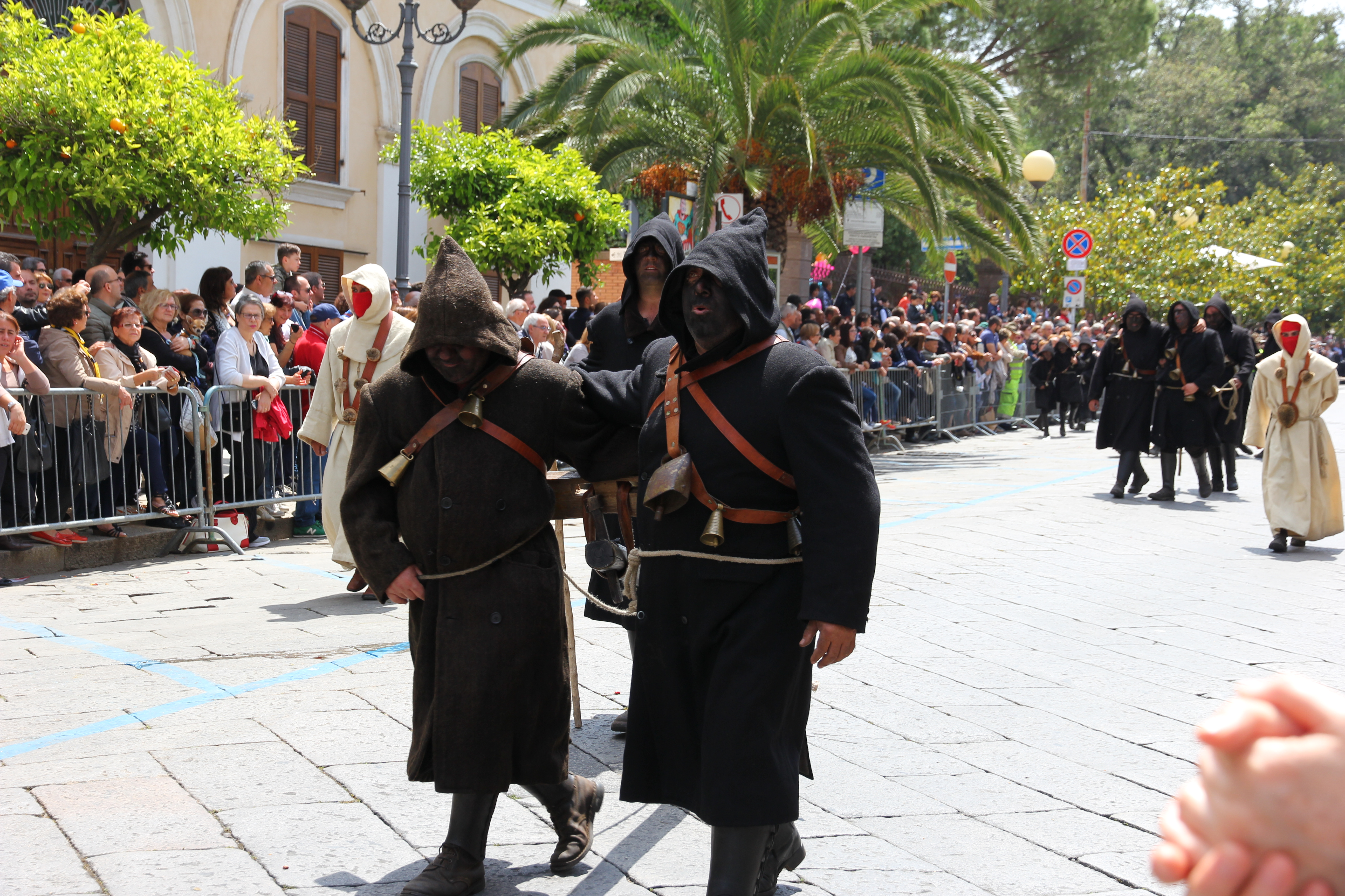 Costume tradizionale